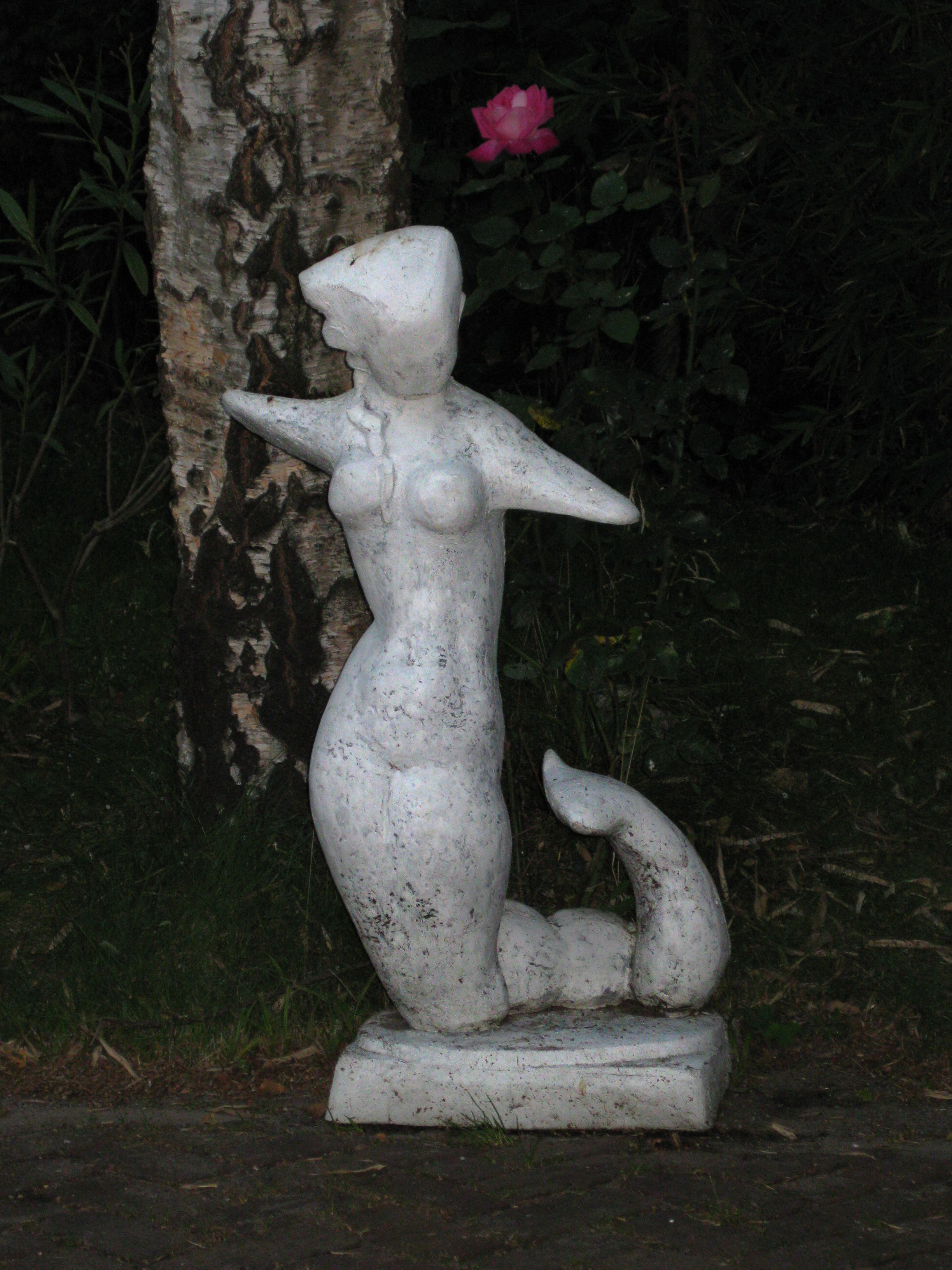 Dit is een zeemeermin, gemaakt door Han Rädecker, uit de persoonlijke collectie van zijn zoon Mart Rädecker.